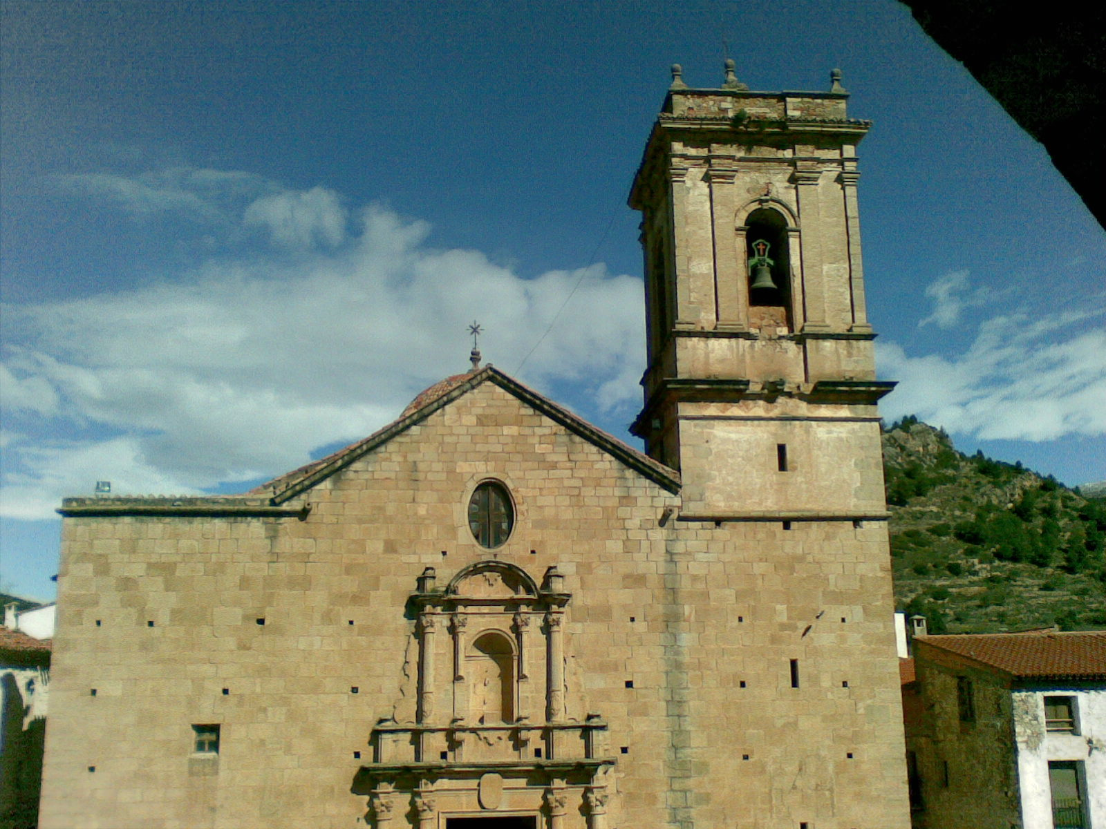 Iglesia parroquial de Villahermosa del Río (Castellón, Comunidad Valenciana)